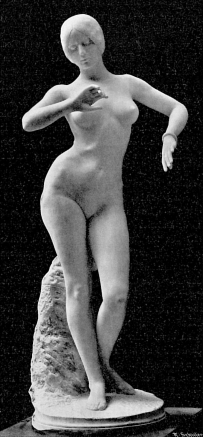 Fig. 258. Tanzerin von Alexandre Falguière Schuler